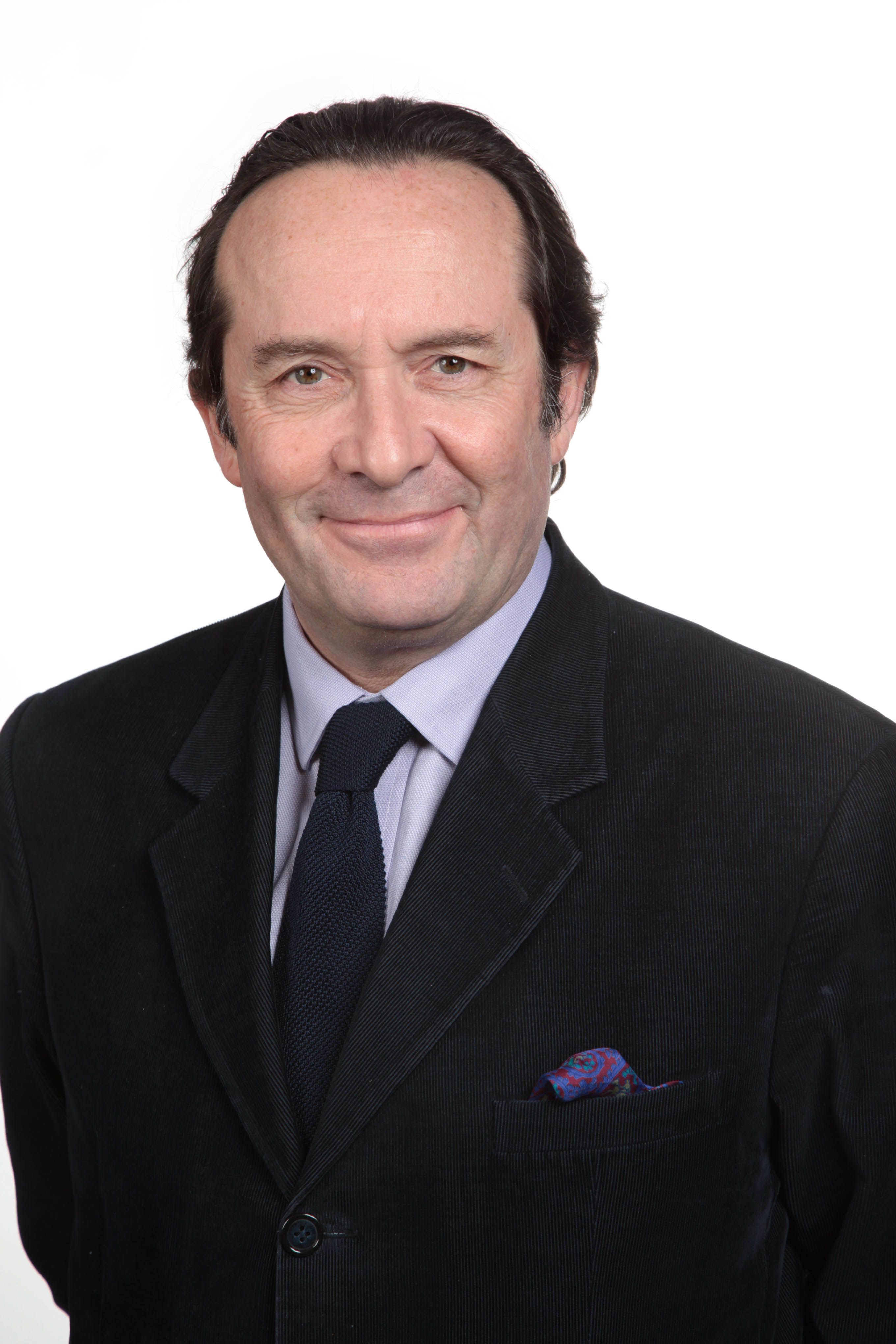 Pierre Bédier, Président du Conseil général des Yvelines